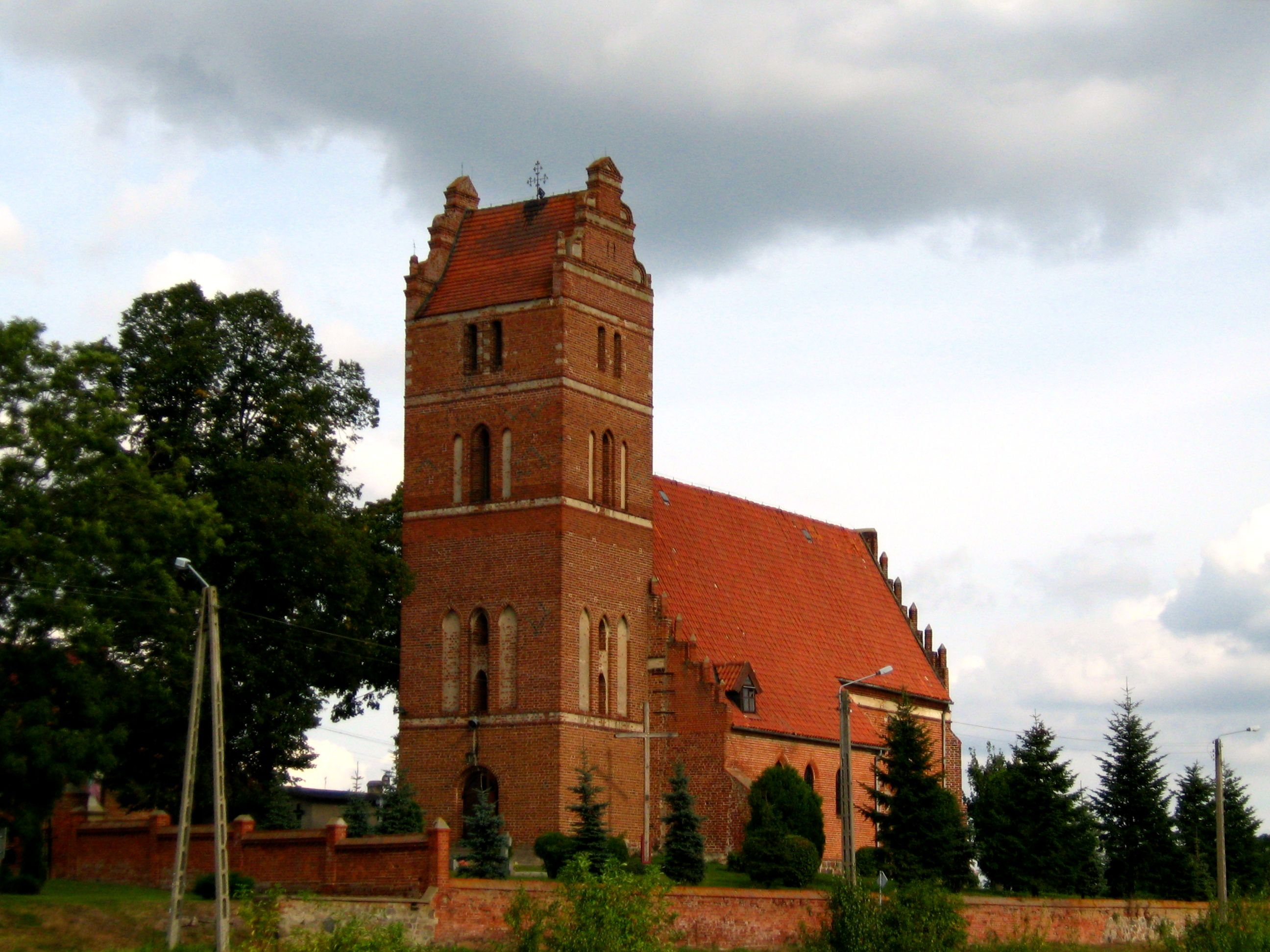 Gotycki Kościół Niepokalanego Poczęcia NMP we wsi Wielki Garc z XVI wieku. Widok od strony południowej pokazujący główną bryłę budynku. Kościół zbudowany z cegły, posiada masywną wieżę i 3 nawy. W wieży 2 dzwony (z 1782 i 1974 roku) oraz stary mechanizm zegarowy. Dach dwuspadowy. Wnętrze z XVII/XVIII wieku. kościół parafialny p.w.Niepokalanego Poczęcia NMP Wielki Garc